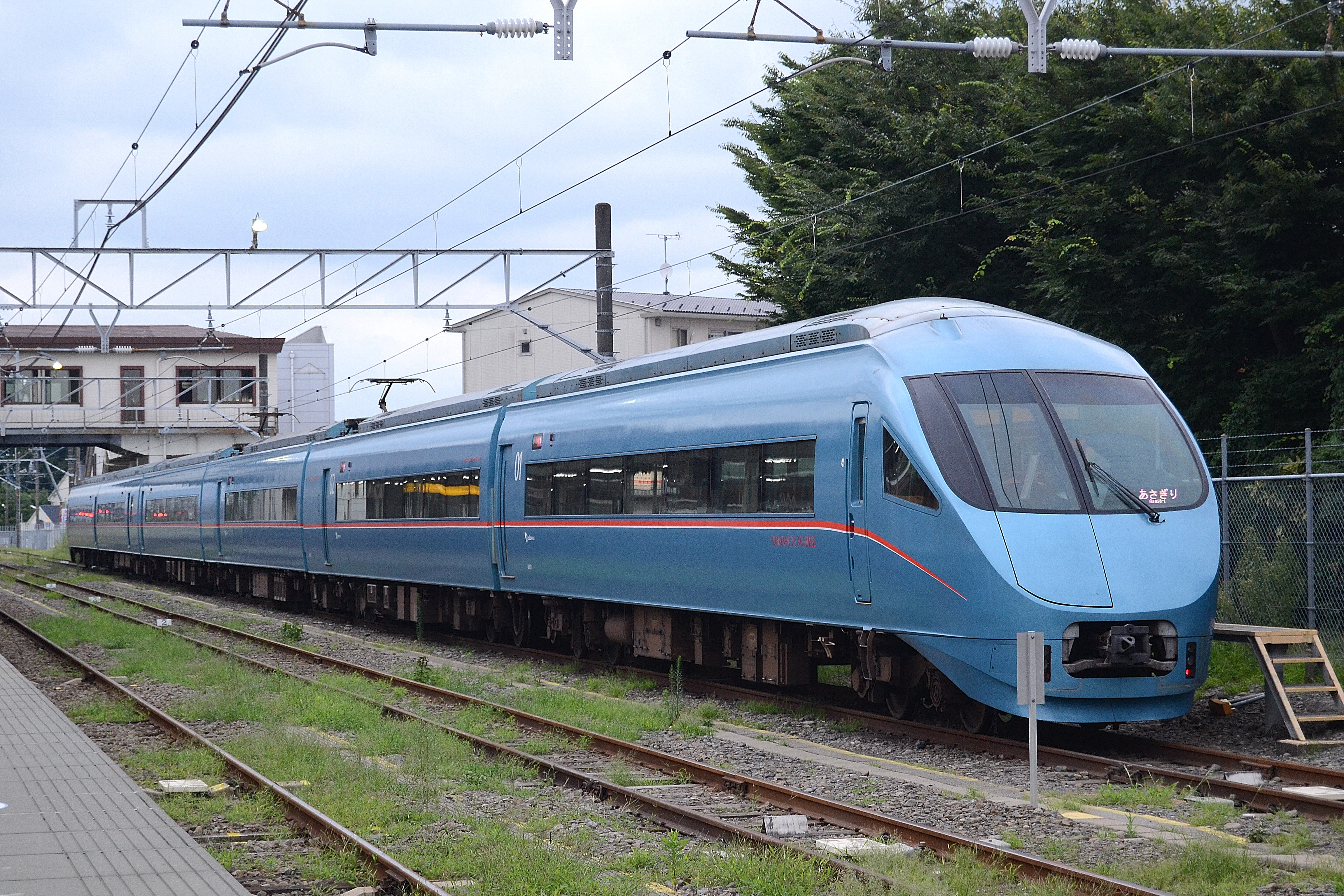 御殿場線の御殿場駅の東側の留置線に留置されている小田急60000 形の特急｢あさぎり｣